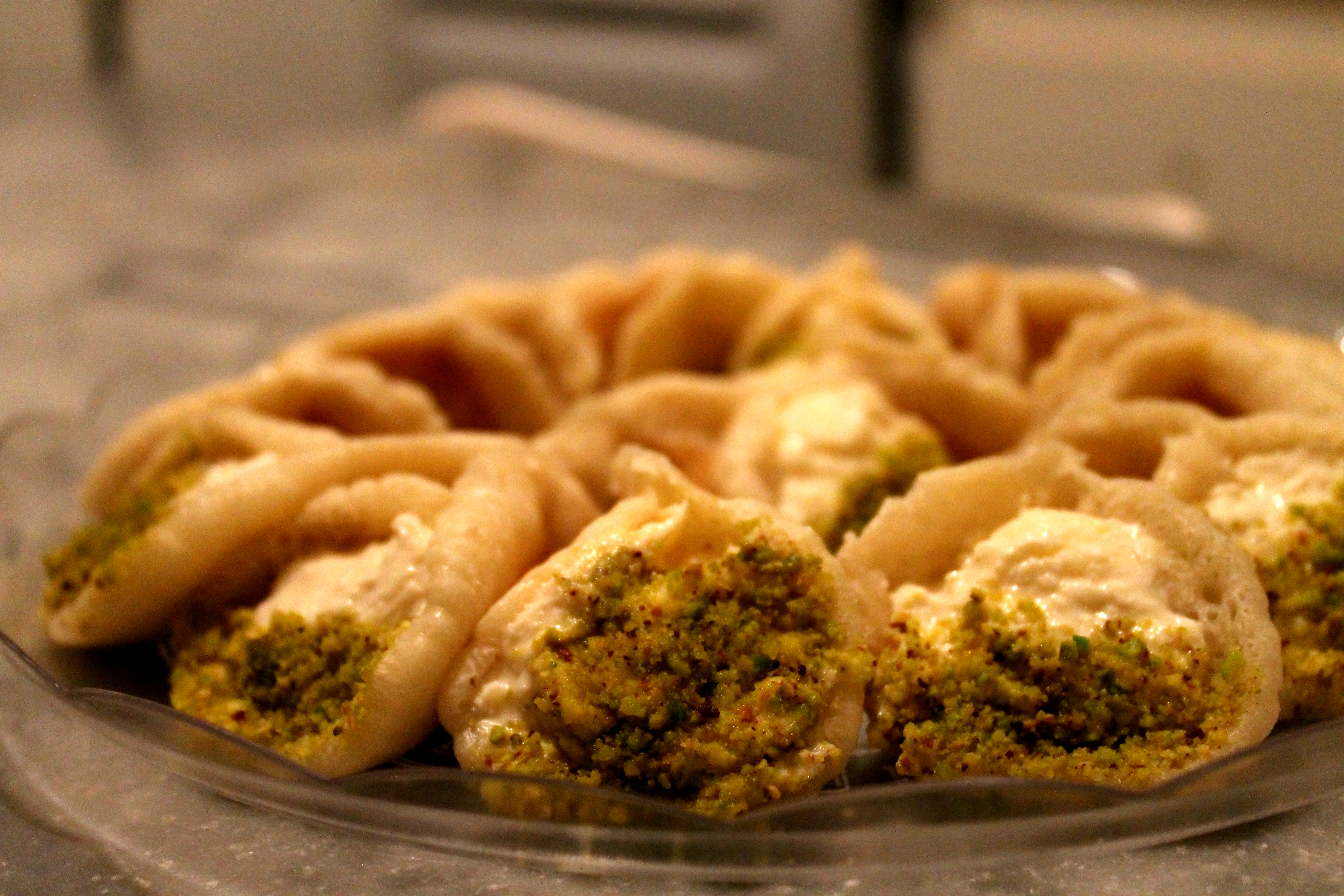 قطايف عصافيري